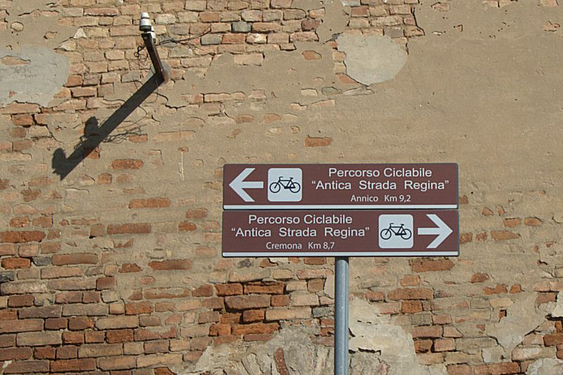 Segnaletica stradale pista ciclabile "Antica Strada Regina"